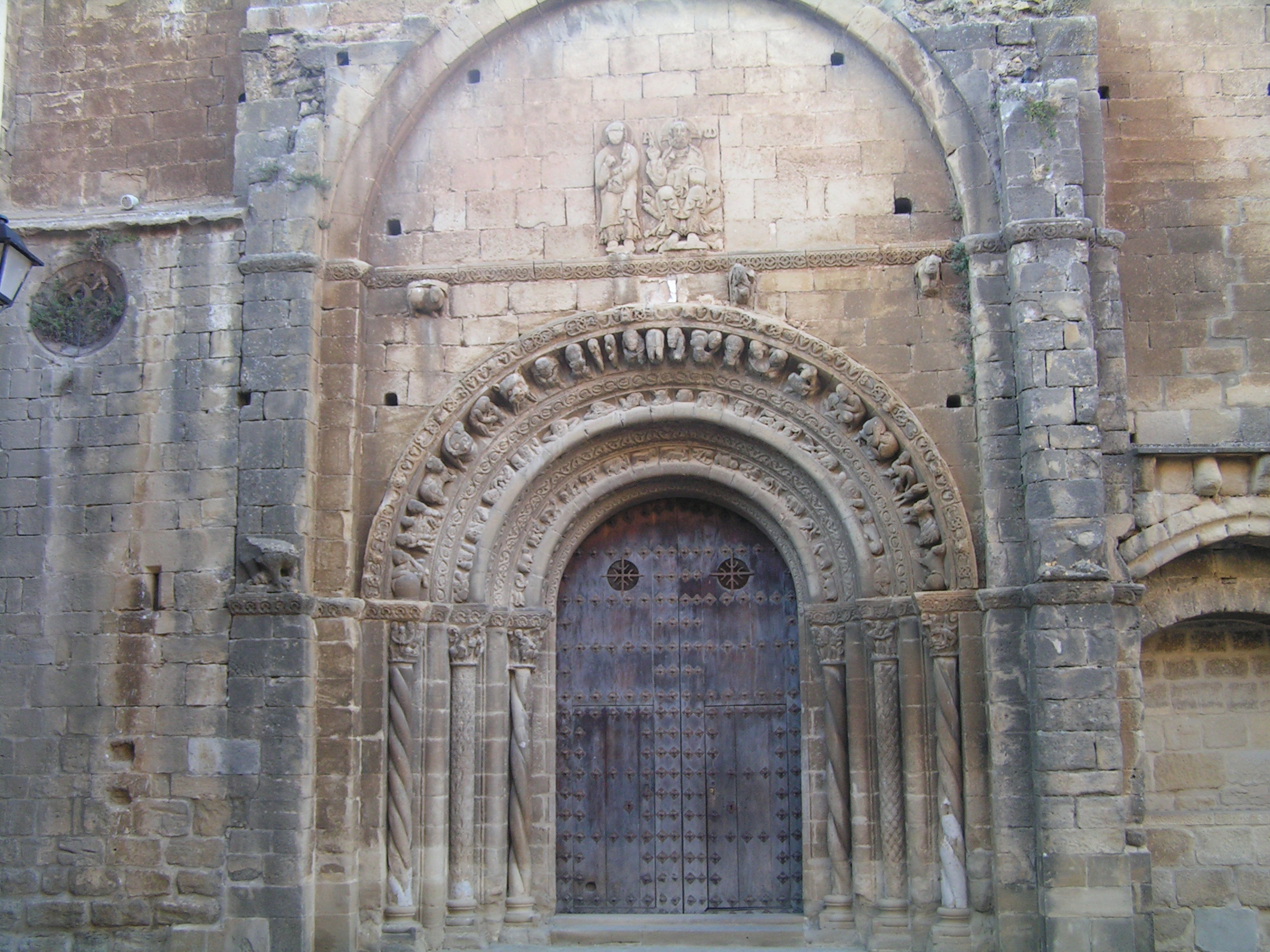 Aragonés: Frontera meridional d'a ilesia de Santa María d'Uncastiello (Uncastiello, Zinco Billas, Aragón).